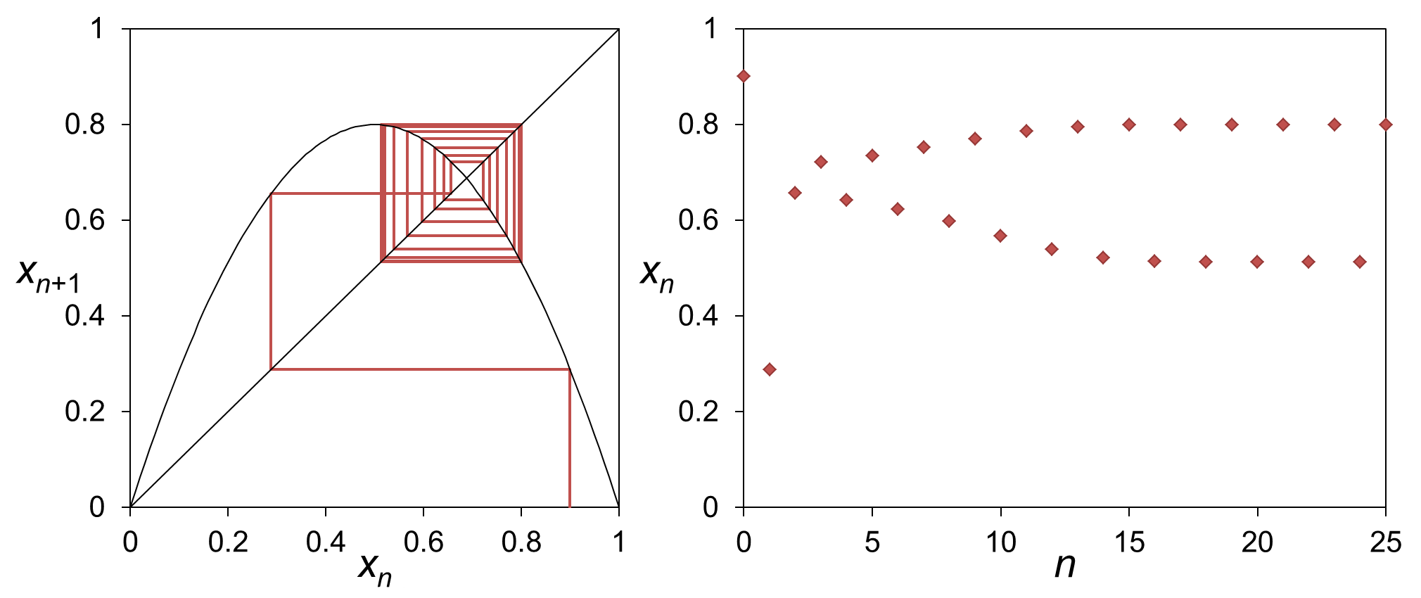 パラメータa=3.2のクモの巣図と時系列